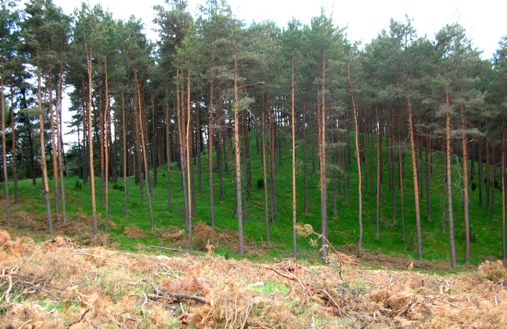 Puszcza Bydgoska, kulminacja wału wydmowego